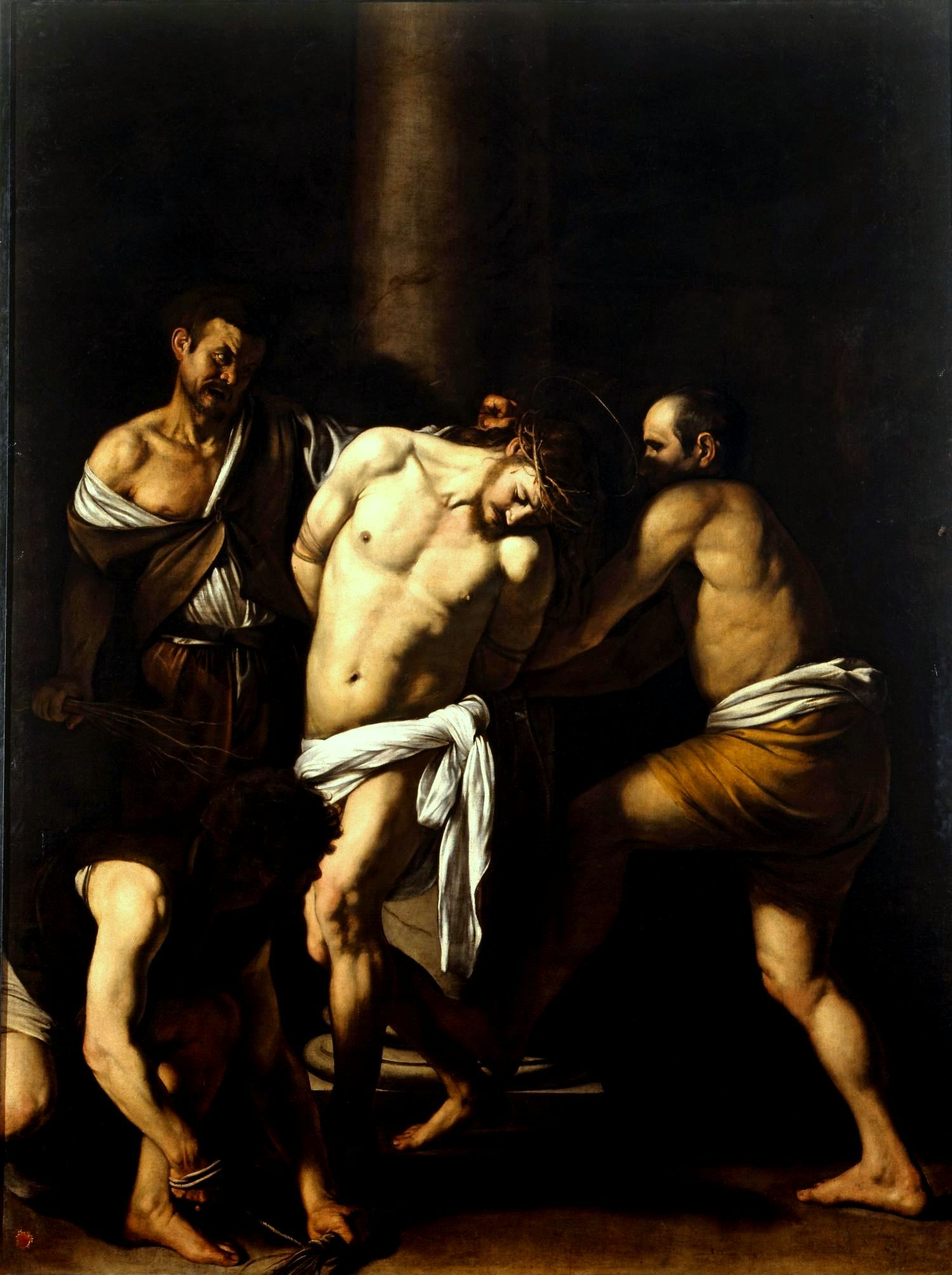 La Flagellazione di Cristo